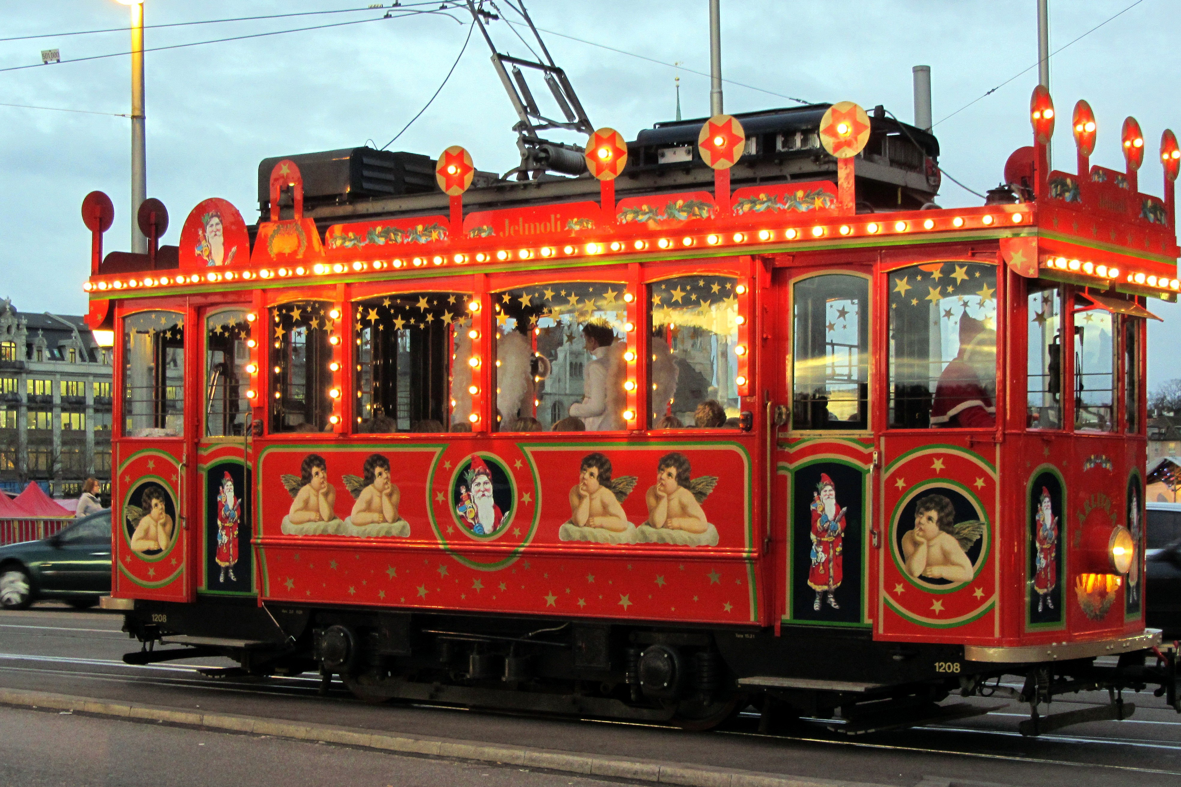 Märlitram at Bellevue in Zürich (Switzerland)